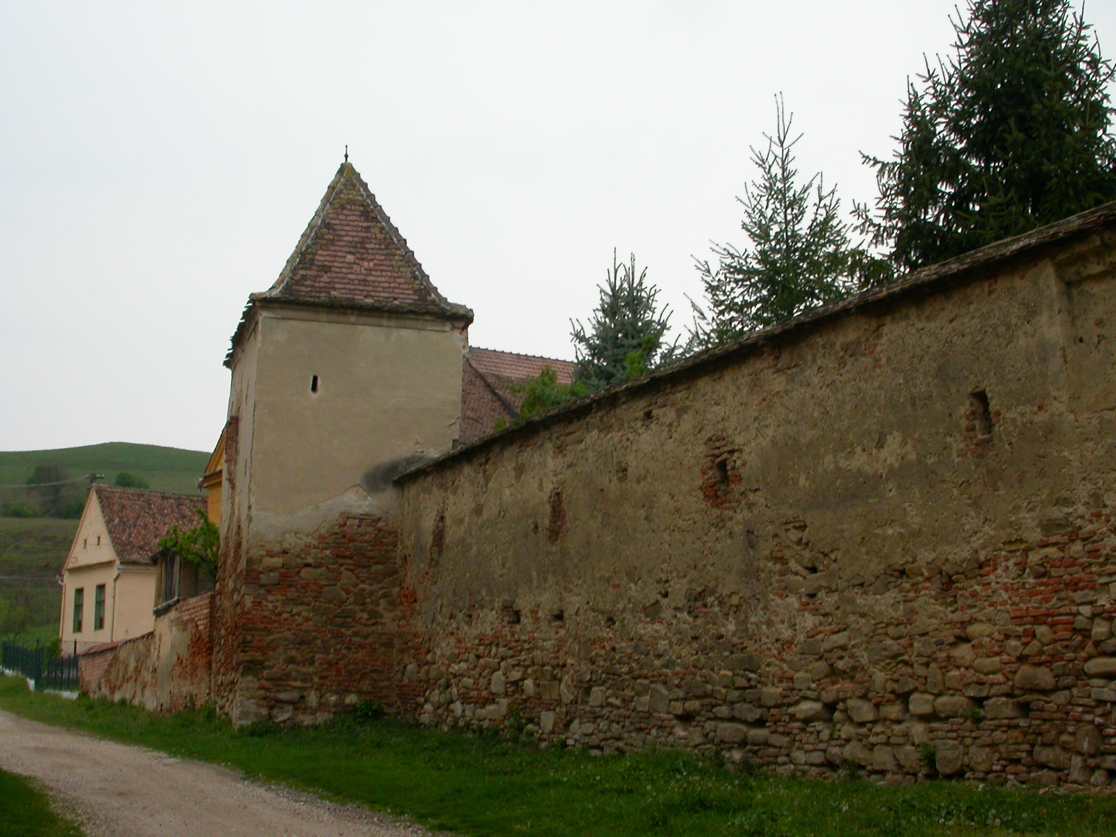 Ansamblul bisericii evanghelice fortificate, sec. XIV - XVII